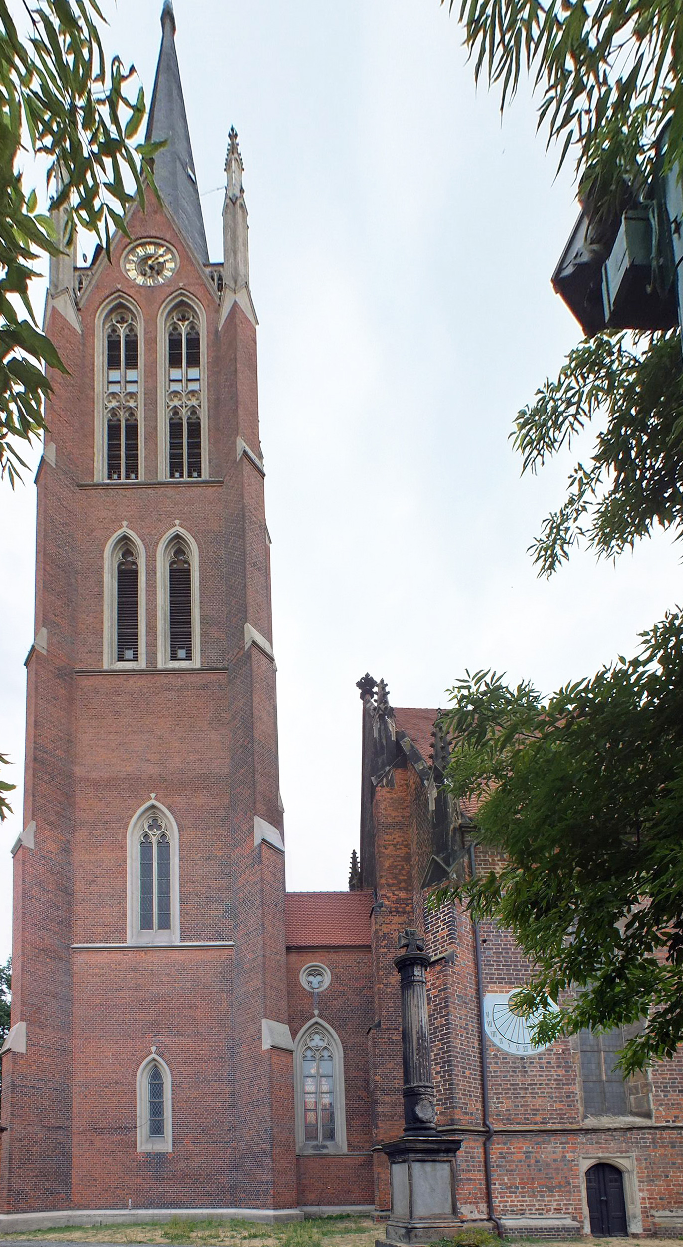 Turm der Stadtkirche St. Marien in Kemberg